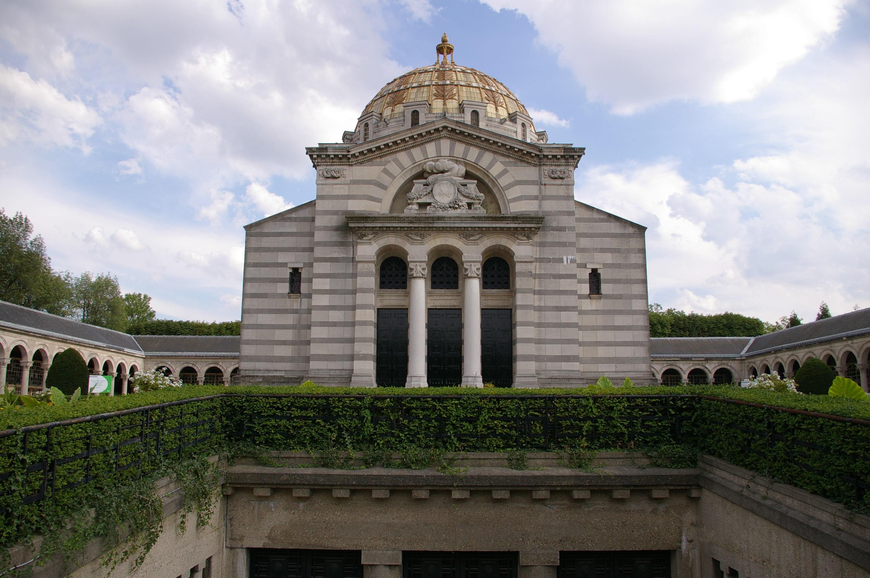 Père Lachaise Cemetery, Paris, France.